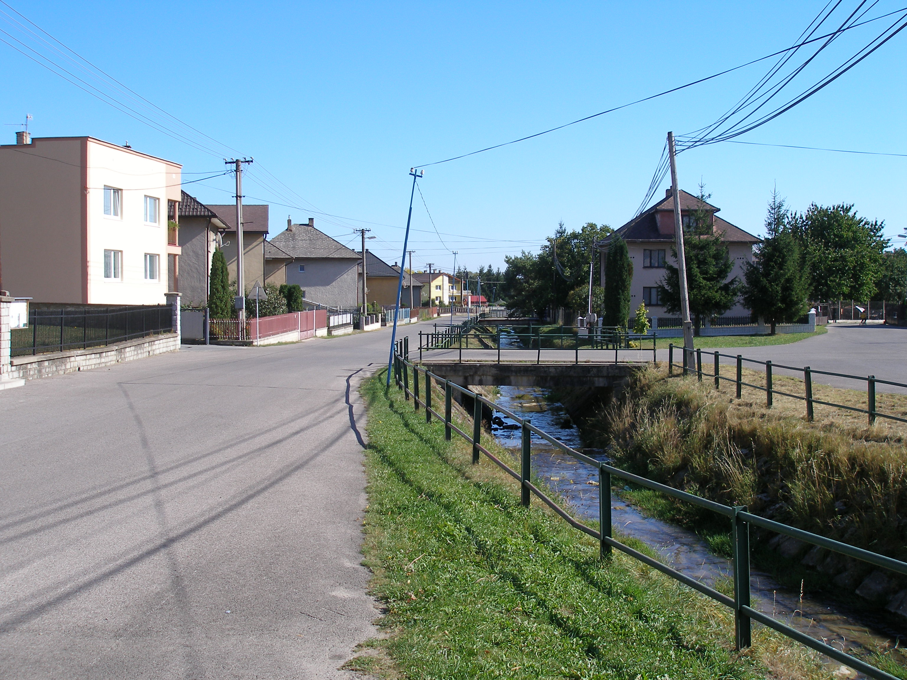 Obec Osikov okres Bardejov.